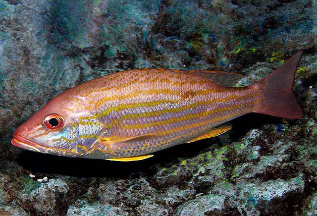 Lutjanus synagris (Ripleys aquarium)